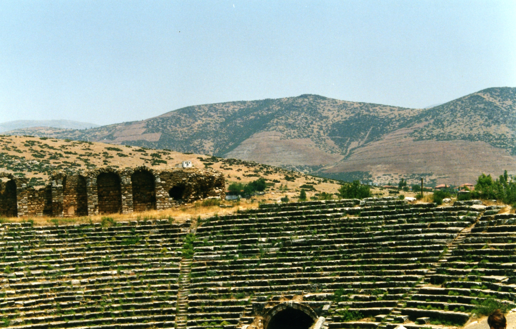 Stadion, Aphrodisias, Türkei